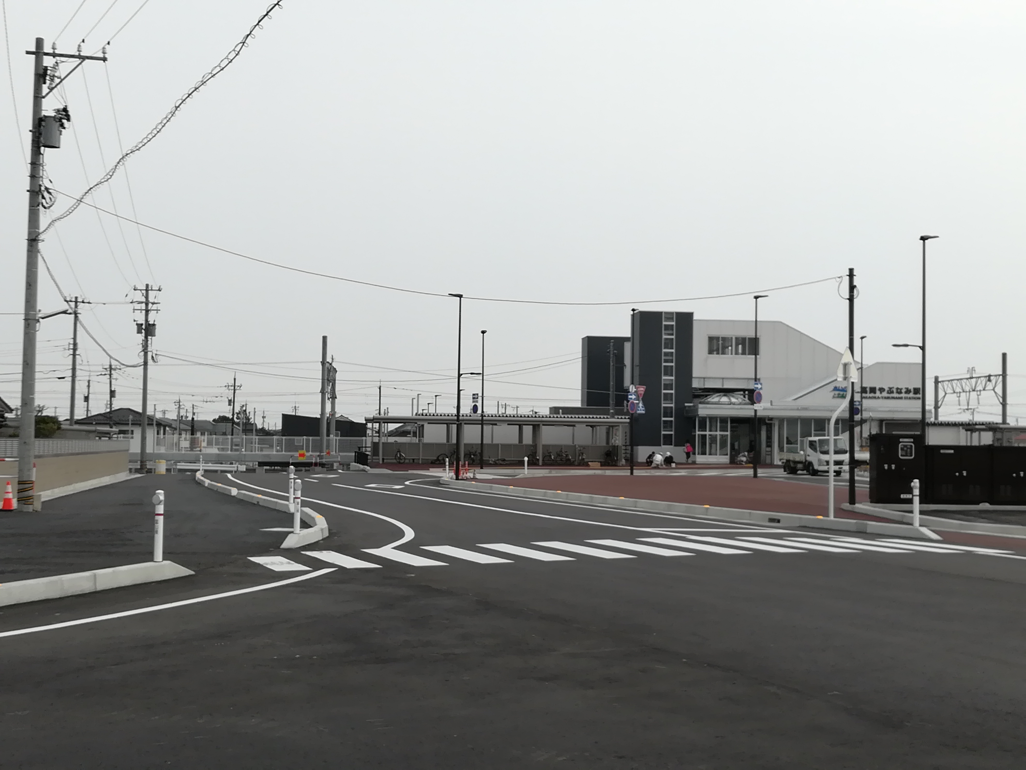 富山県道131号高岡やぶなみ停車場線から高岡やぶなみ駅を望む